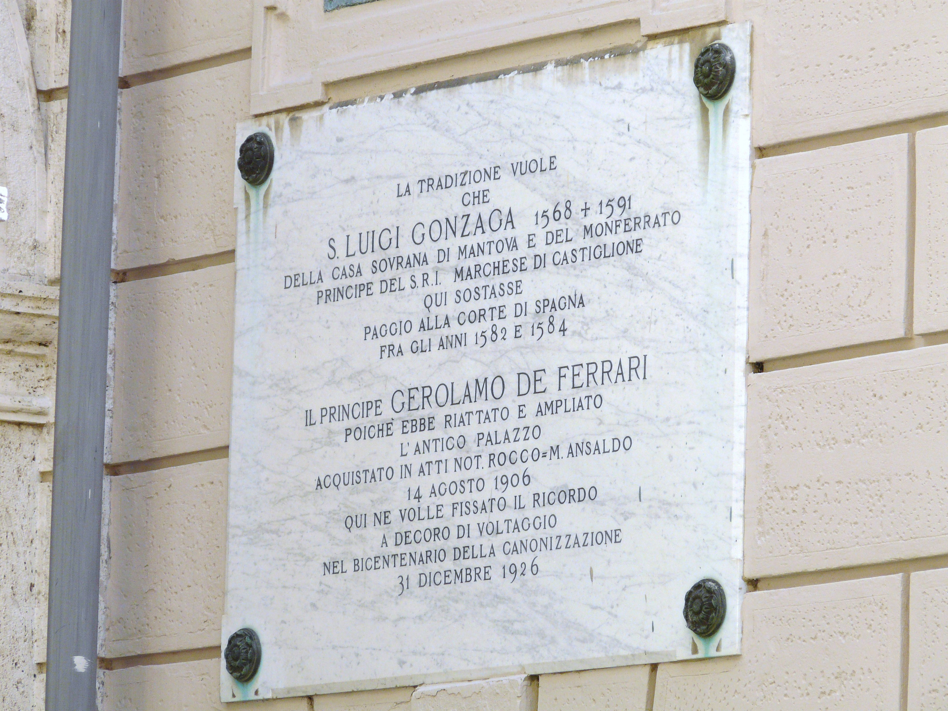 Lapide di un palazzo del centro storico di Voltaggio, Piemonte, Italia